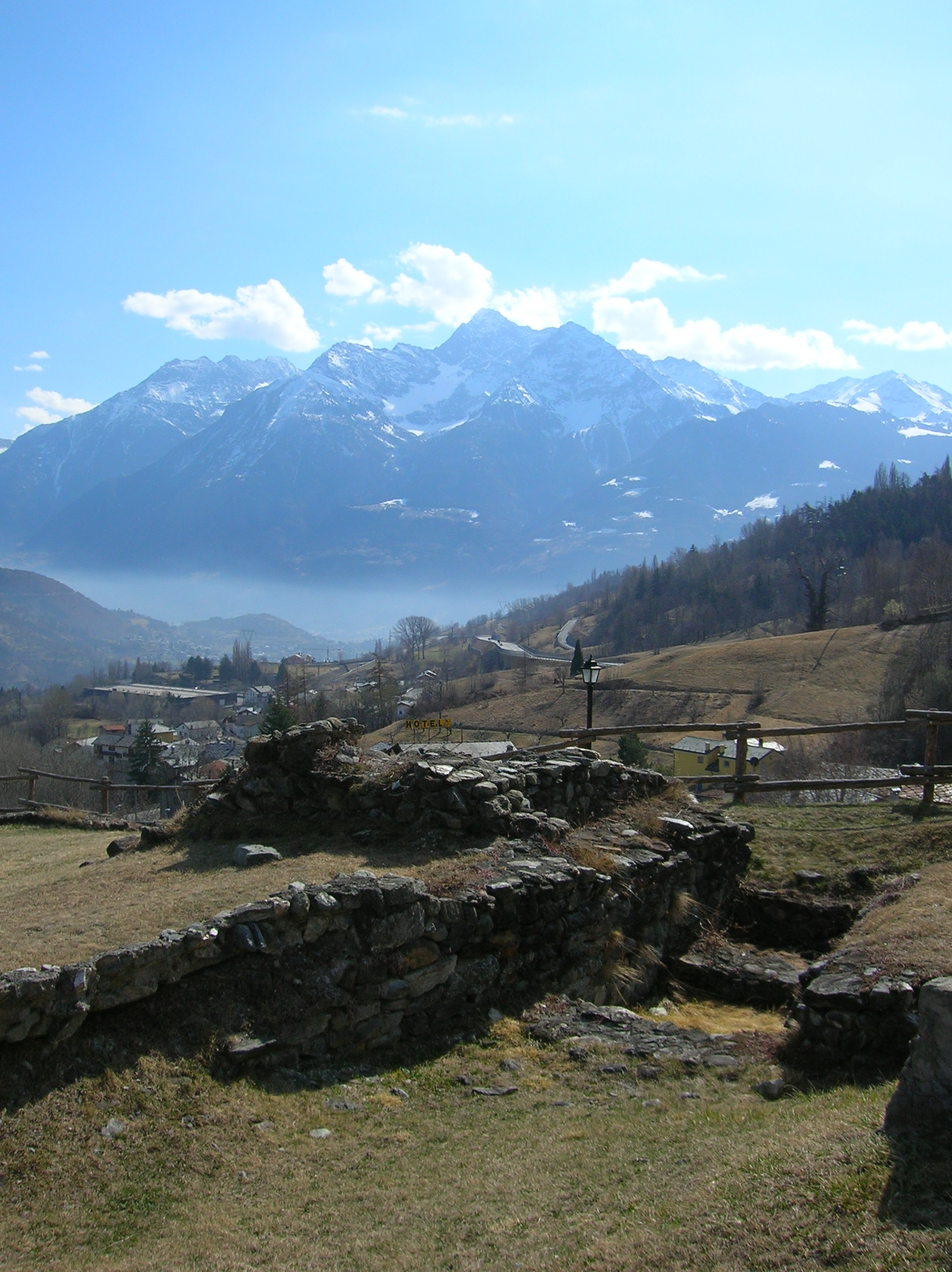 Panorama dal parco De La Tour con i resti intorno alla Torre di Gignod, Gignod, Valle d'Aosta, Italia.